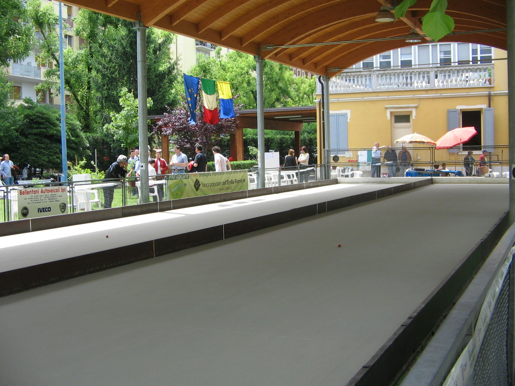 Műanyagborítású bocsapálya (Modena, Olaszország)